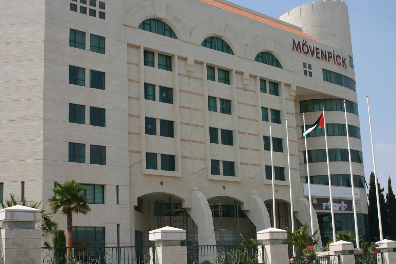 Das Mövenpick-Hotel in Ramallah, Palästina. Object location31° 53′ 43″ N, 35° 12′ 17″ E